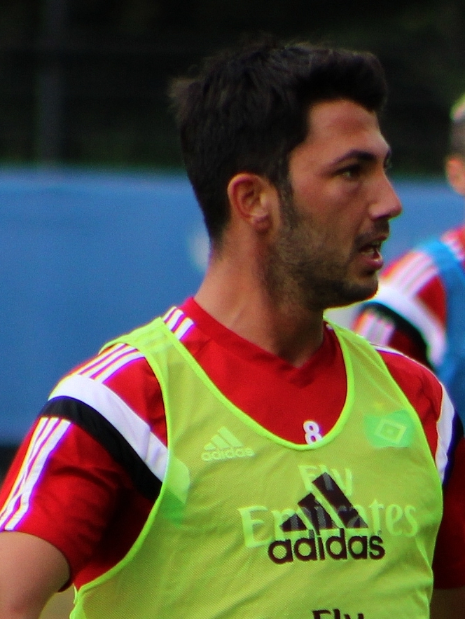 Tolgay Arslan beim HSV-Training am 14. August 2014.